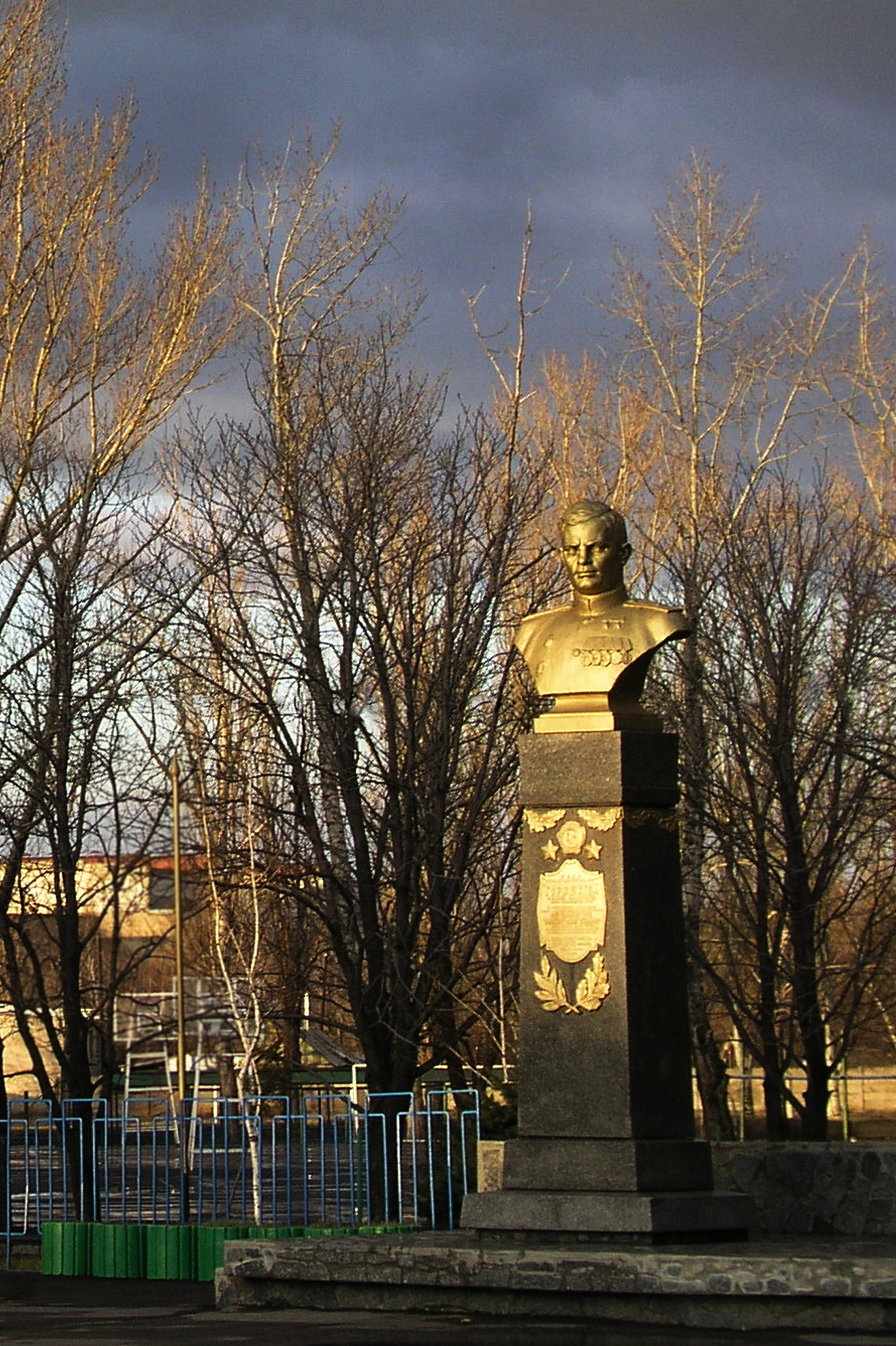 бюст дважды героя Советского Союза М.И. Горюшкина находится в центре города. Последние лучи заходящего солнца красиво освещают бюст на фоне хмурого январского неба